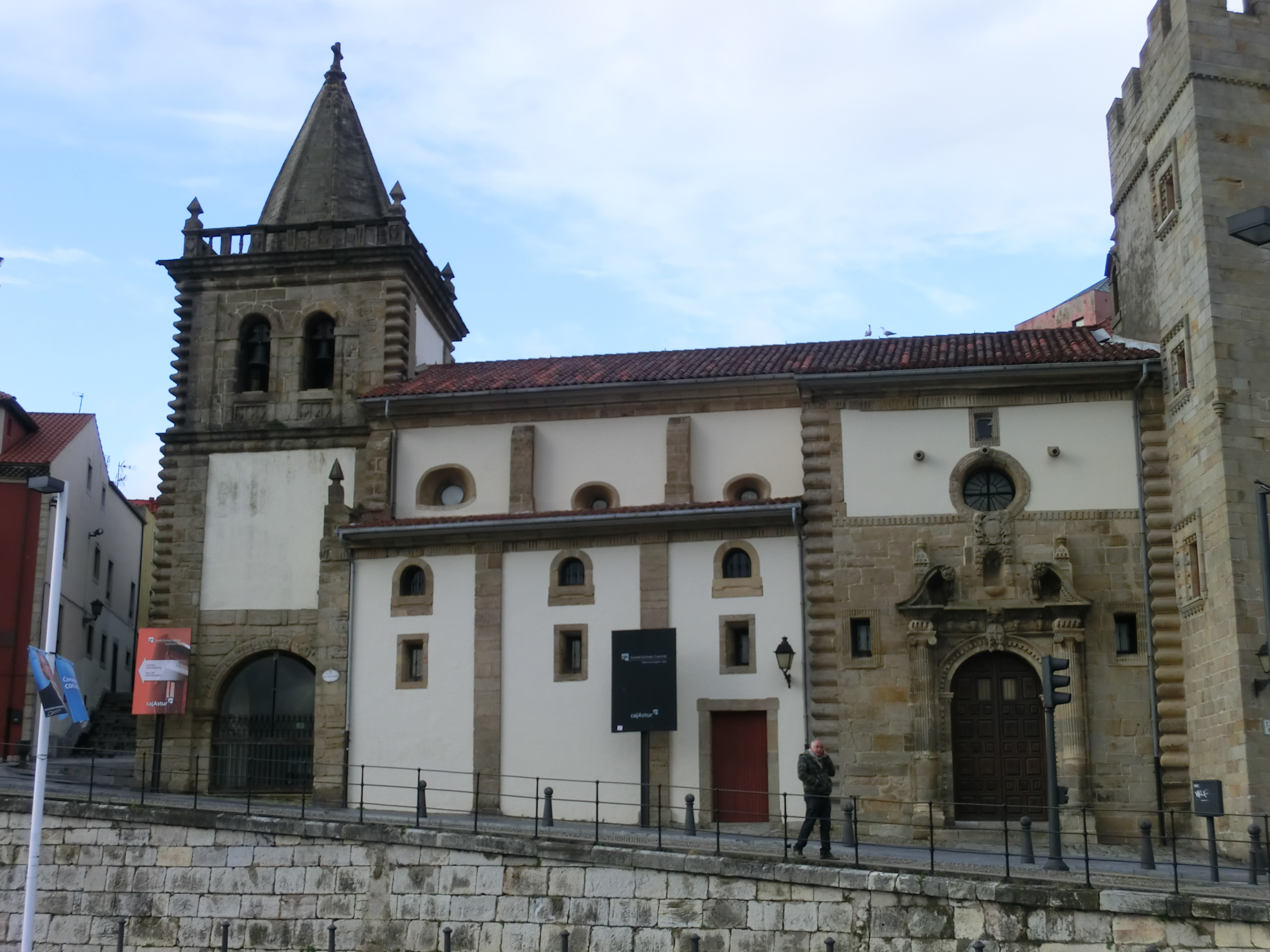 Fachada principal de la Colegiata de San Juan Bautista, en Gijón (Principado de Asturias, España).